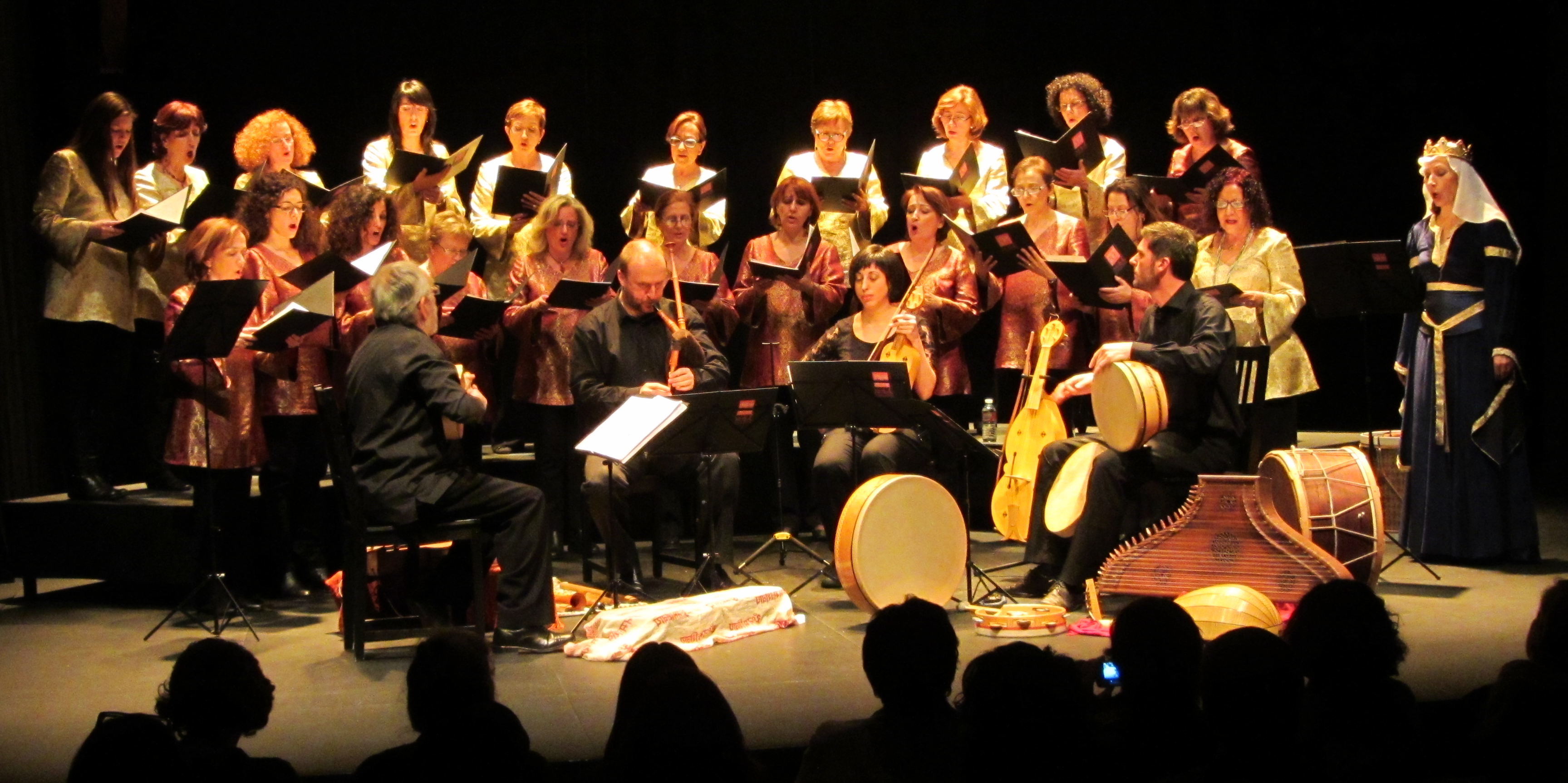 Concierto del Grupo Coral Nuba en el Corral de Comedias de Alcalá de Henares (Comunidad de Madrid - España) el 6 de marzo de 2014. Concierto titulado: "Aliénor, música en la corte de Leonor de Aquitania".